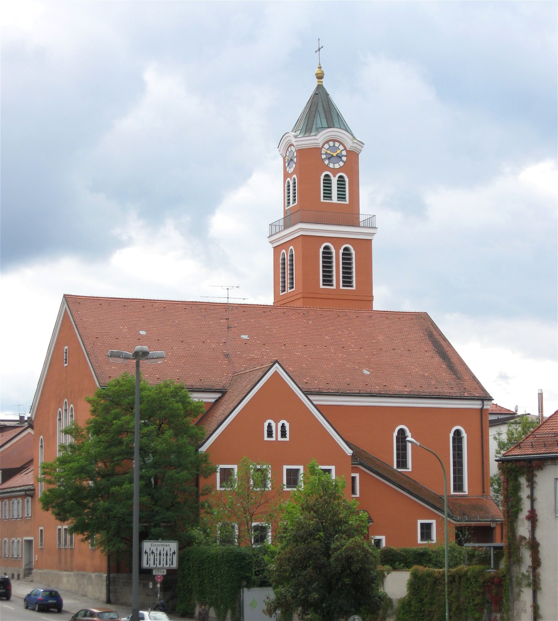 Martin-Luther-Straße 4; Evang.-Luth. Lutherkirche samt Pfarrhaus, Baugruppe mit Turm, historische Anklänge, 1926–27 von Hans Grässel; städtebauliches Pendant zur Hl. Kreuz Kirche Giesing (siehe Ichostraße 1).